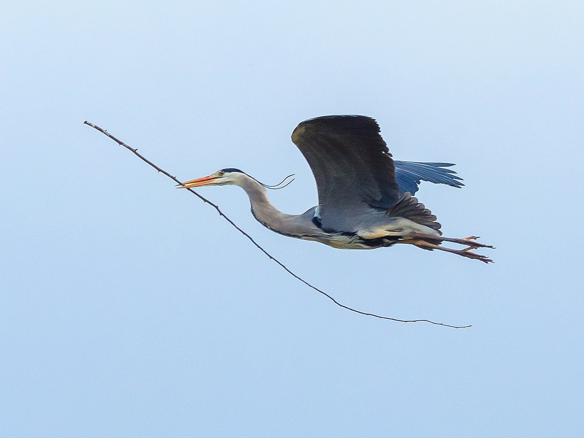 Gråhäger, Grey heron, Ardea cinerea, Djurgården, Stockholm, Sweden